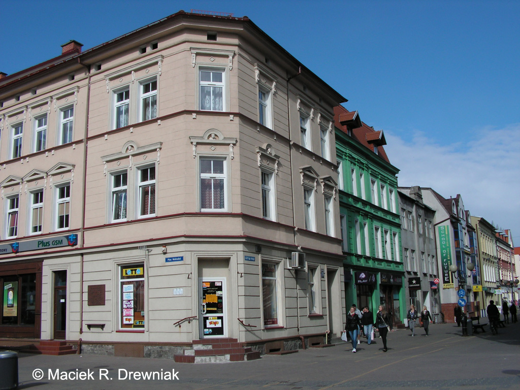 Szczecinek, Plac Wolności 16